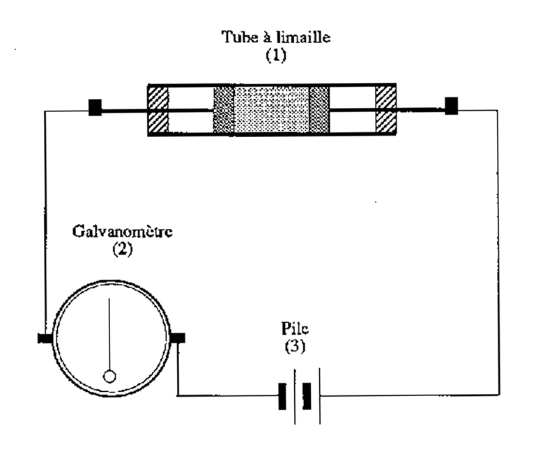 Schéma électrique de l'expérience fondamentale de Branly